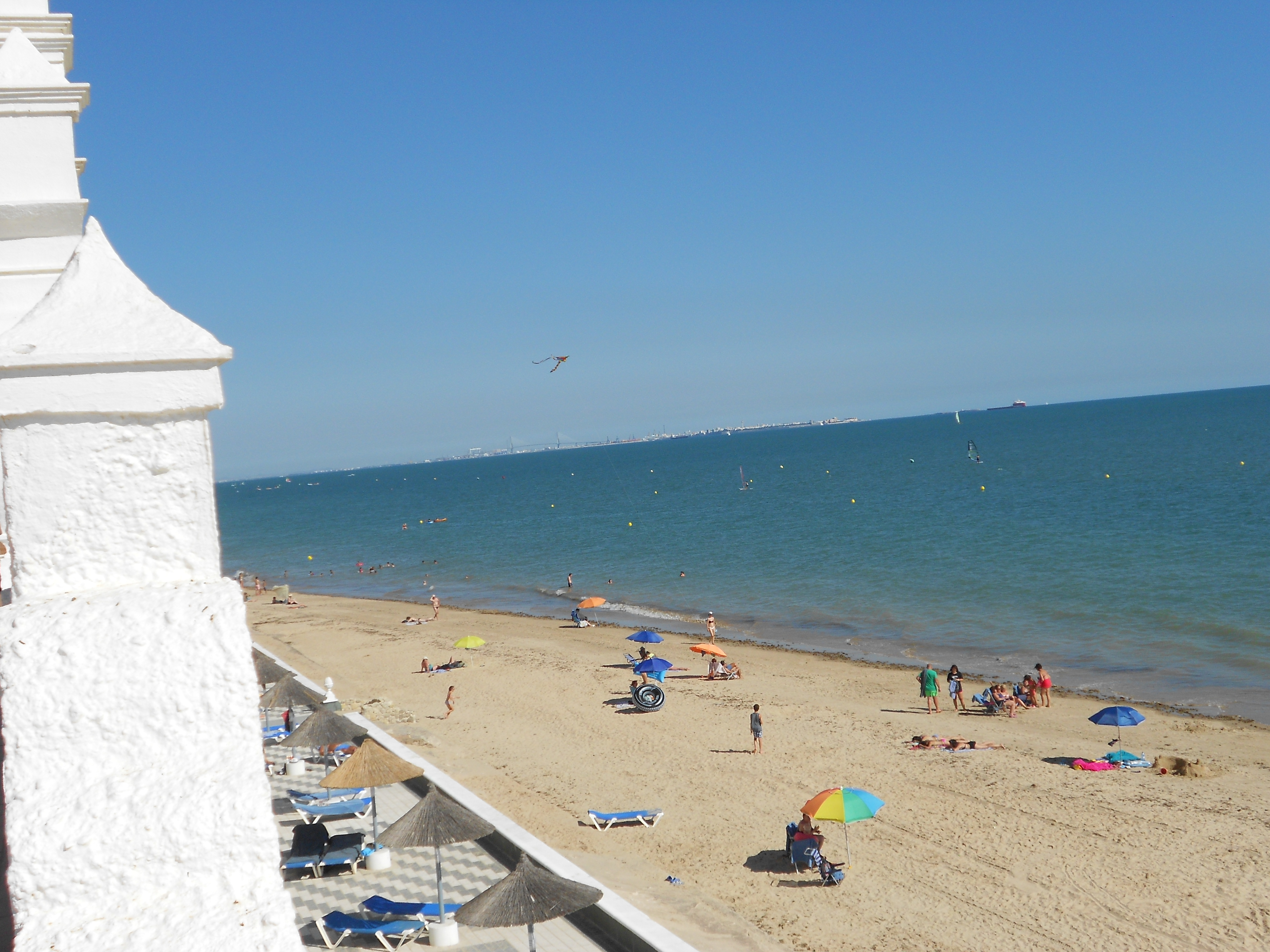 Strand in Rota mit Blick auf Cádiz